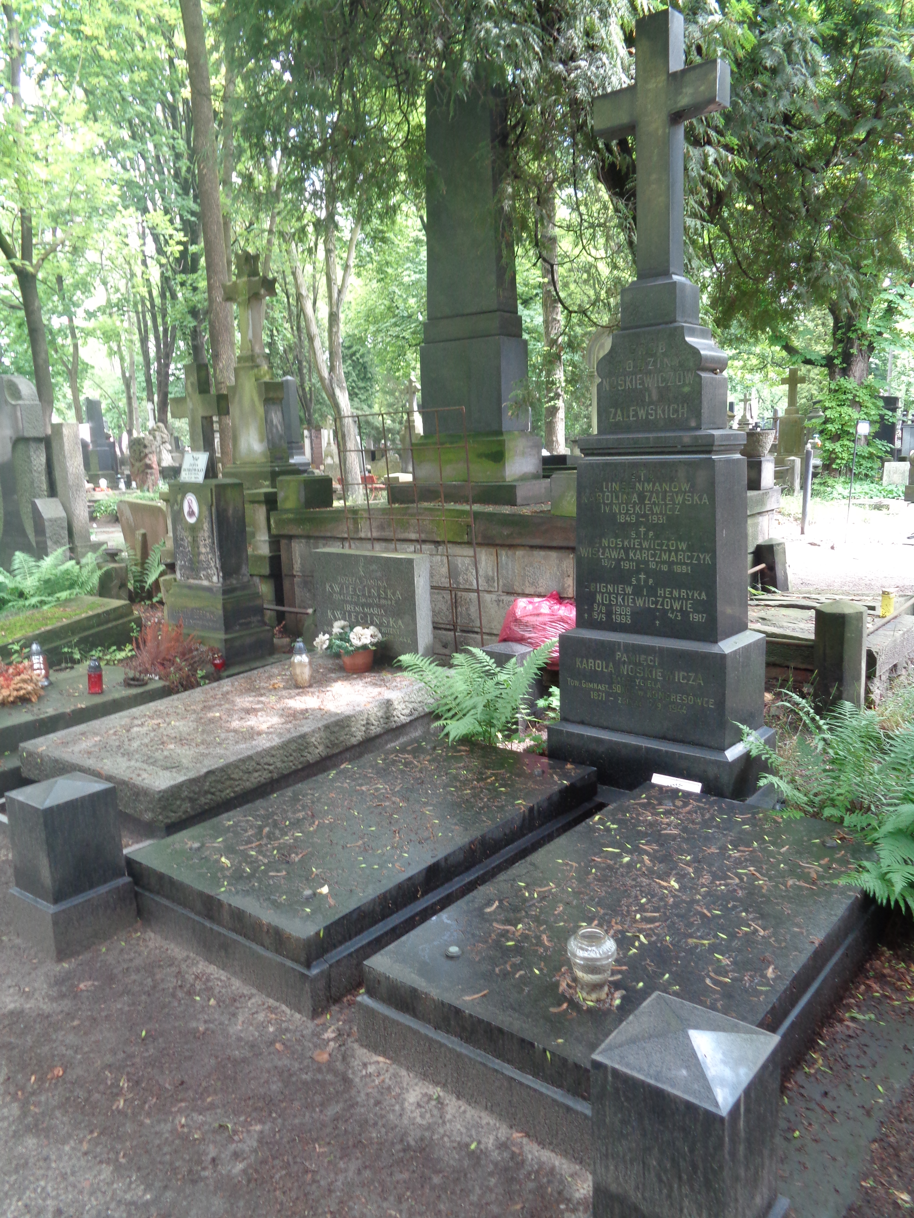 Grób Wislawy Noskiewicz na Cmentarzu Powązkowskim